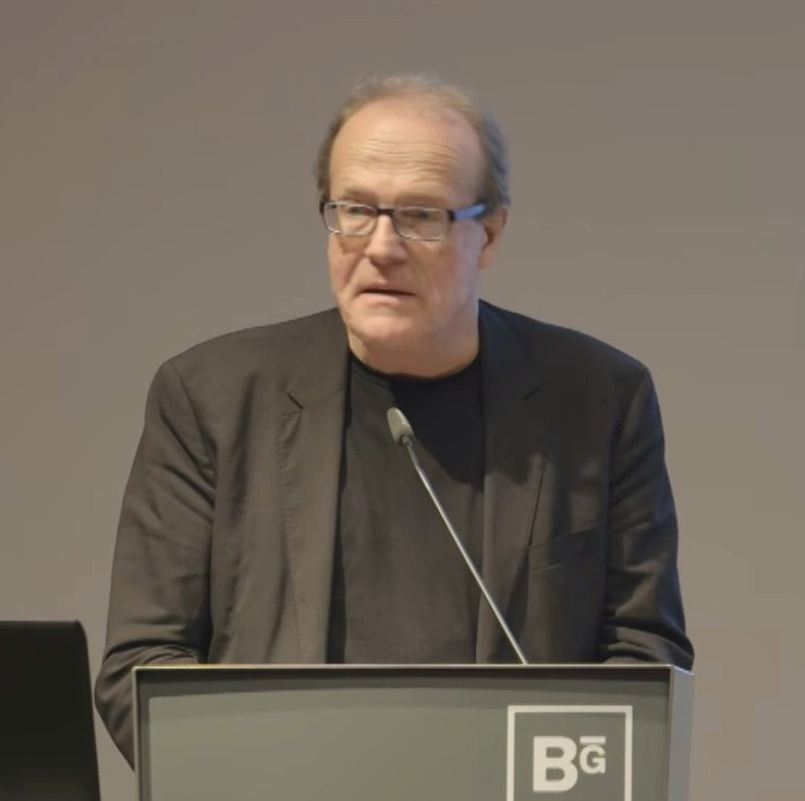 Stiftung verleiht Hans-und-Lea-Grundig-Preis 2015 an Olga Jitlina, Lith Bahlmann und Matthias Reichelt sowie Ines Weizman und ihr Team Berlin, 26.11.2015